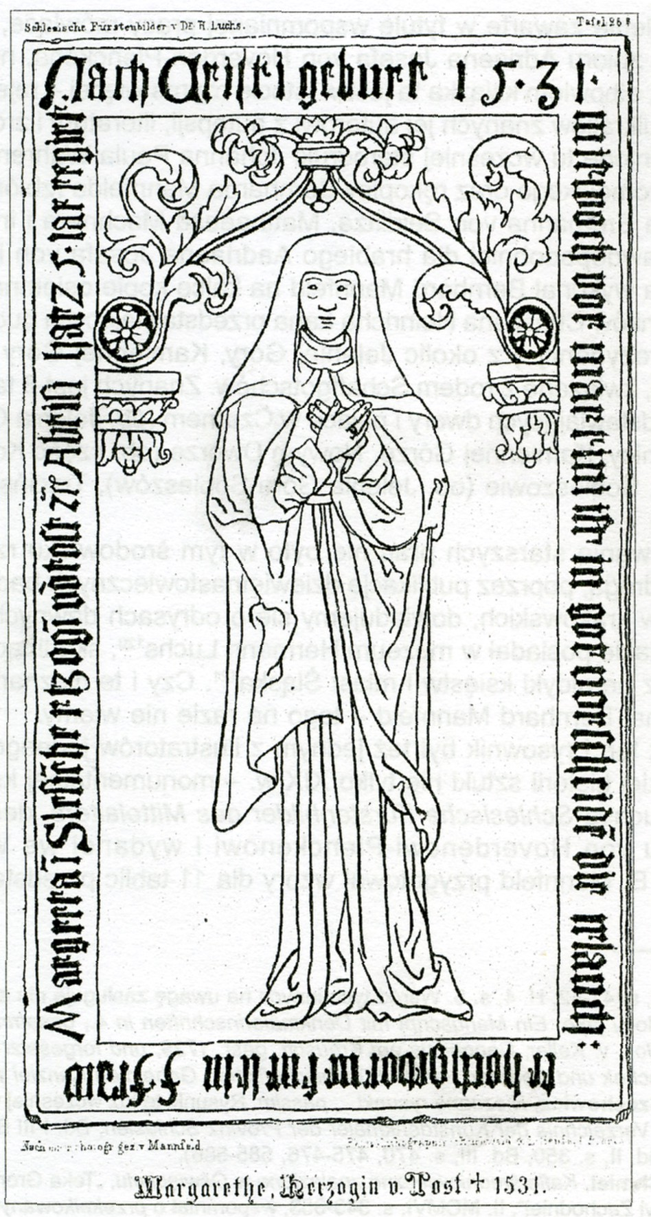 Abbildung nach der im Breslauer Ursulinenkloster (dem früheren Breslauer Klarissenkloster) bis zum heutigen Tage bewahrten Grabplatte für Margaretha, Herzogin von Tost († 1531), Äbtissin des Breslauer Klarissenklosters; Ursulinenkkloster, Breslau, Niederschlesien, Polen.Inschrift: Nach Christi geburt 1531 / mitwoch vor martini ist in got vorscheide[n] die erlauch: / te hochgeborne furstin F Frau / Margrita i[n] Slesie[n] hertzogi[n] vo[n] tost zra (etc) Abtisi[n] hat 25 iar regirt.